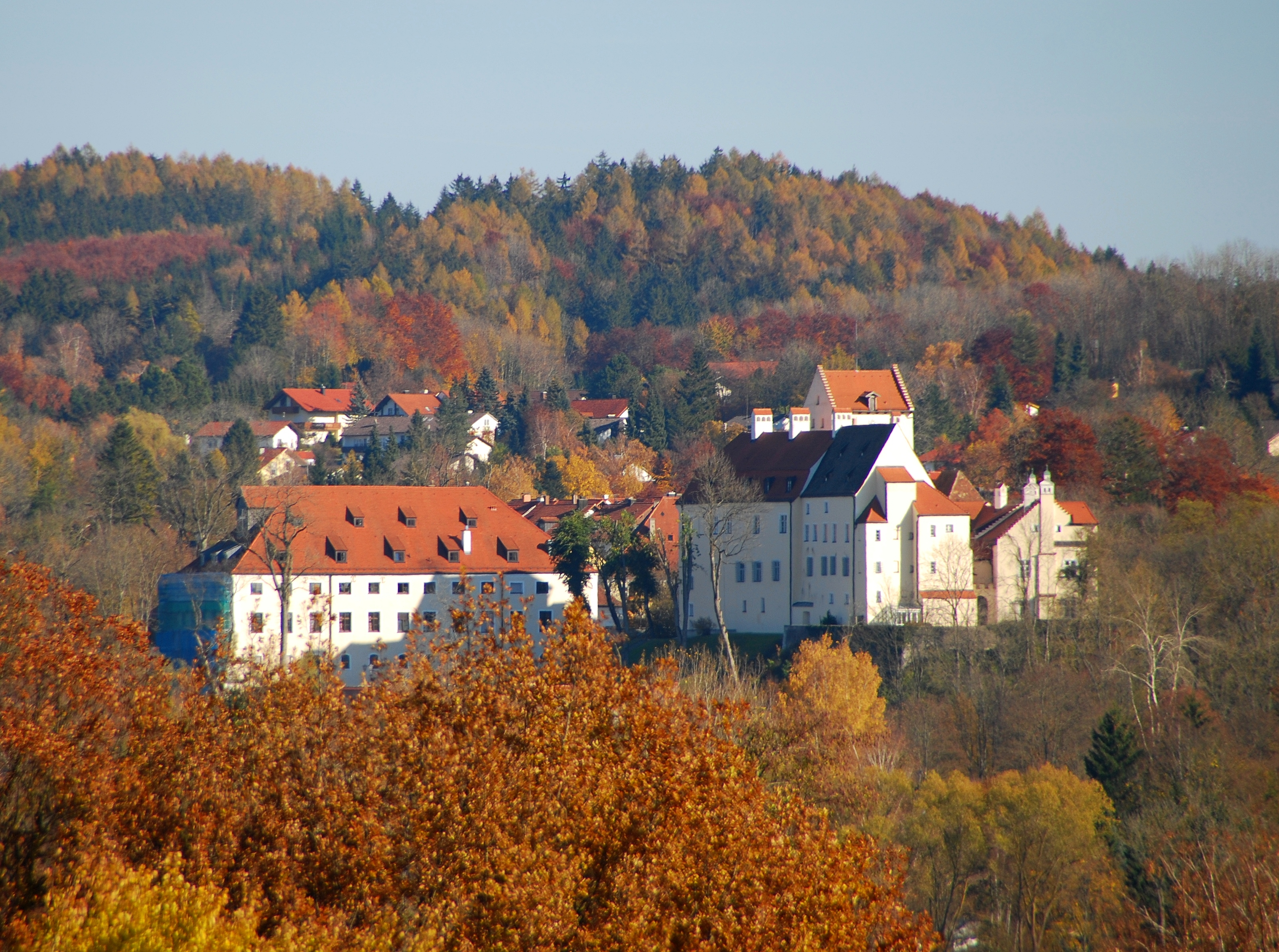 Blick auf Schloss Seefeld